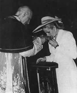 Eva Perón y un obispo.